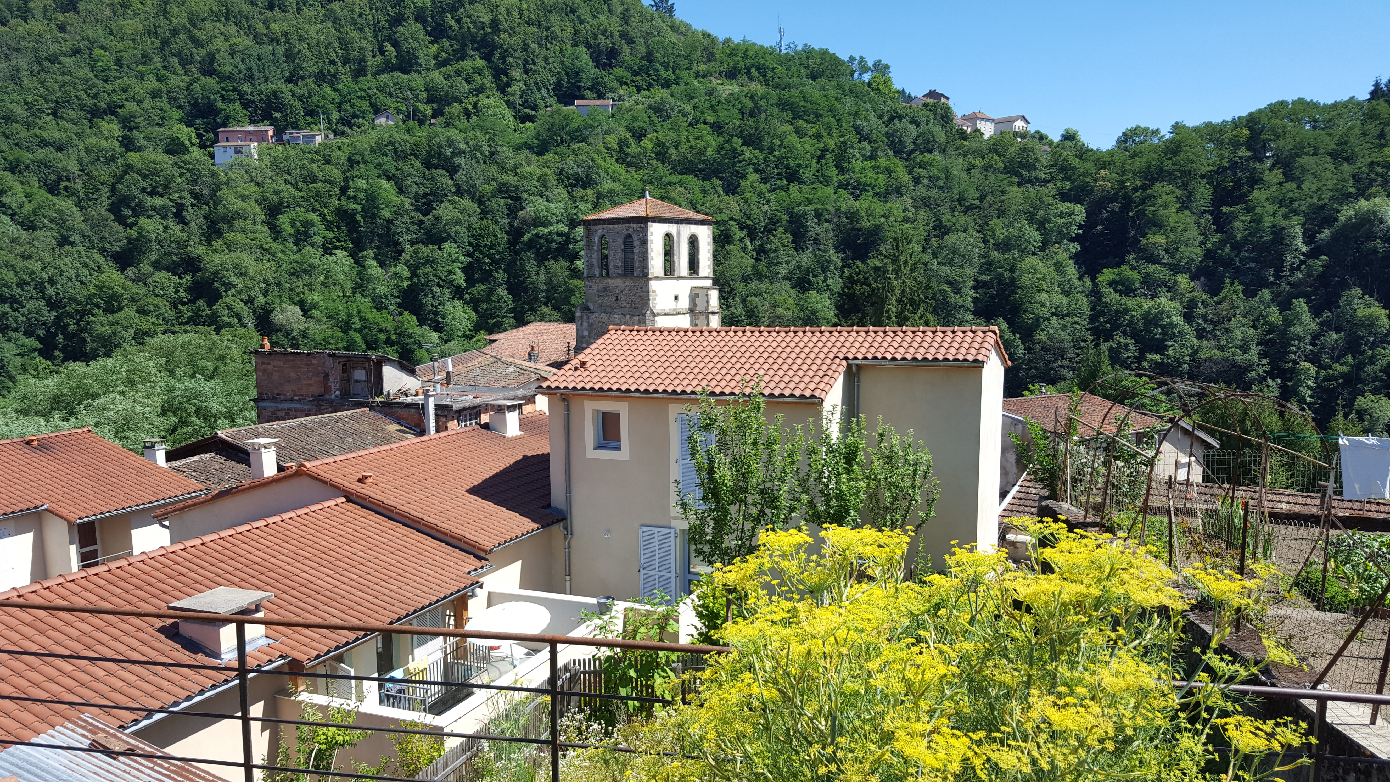 église saint-Jean de Thiers en Auvergne.